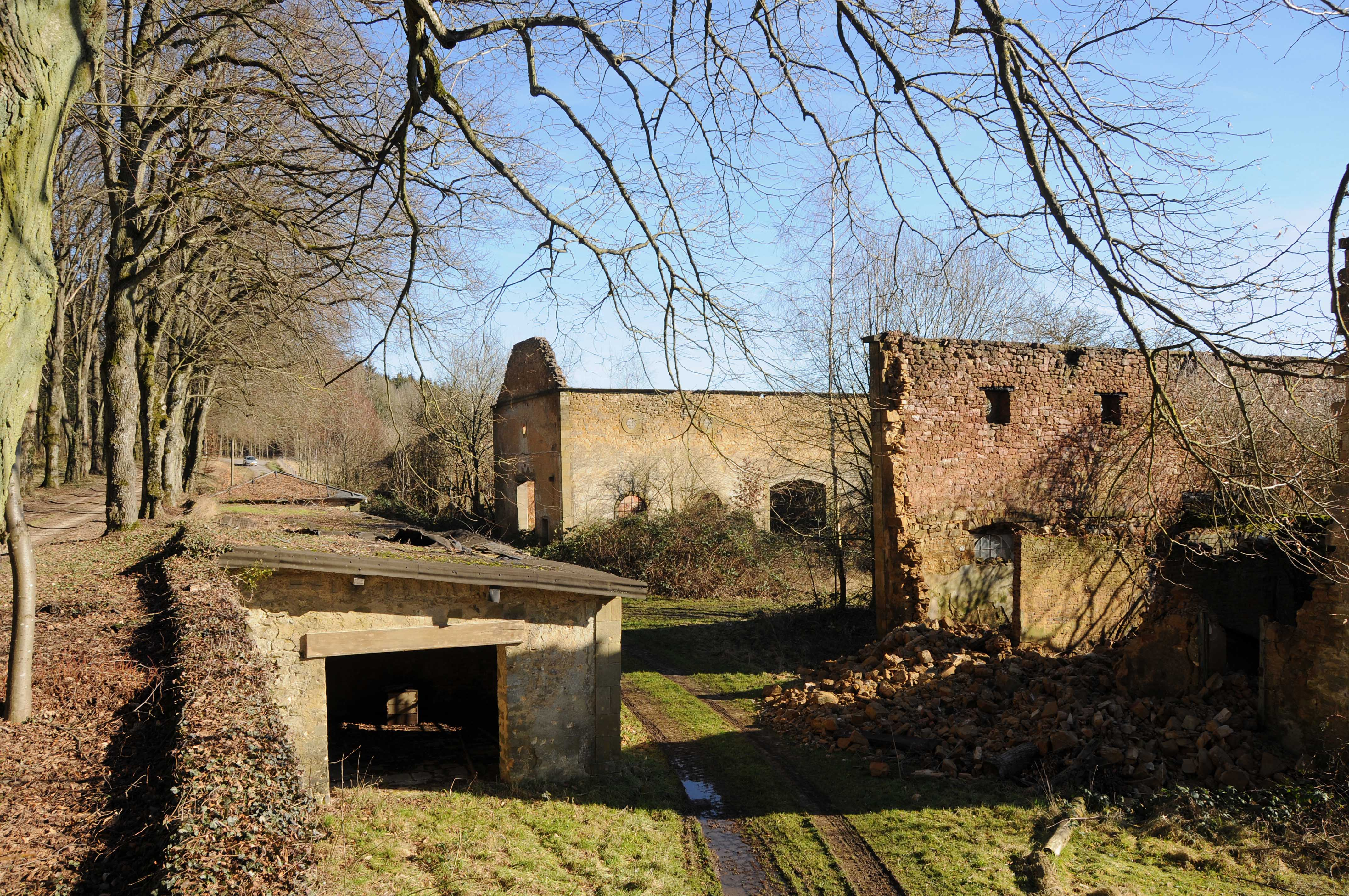 Scheedhaff.